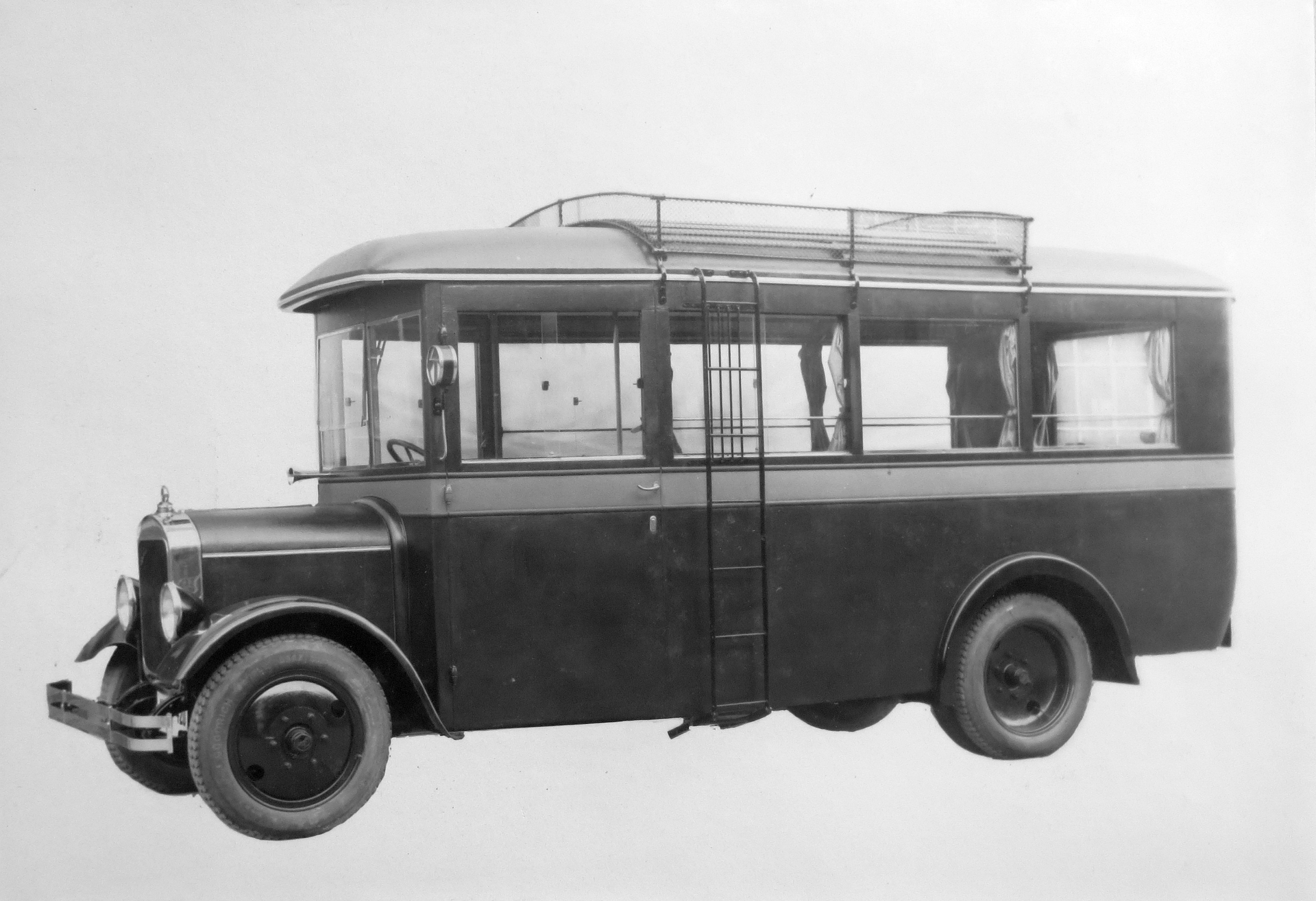 Walter Commercial, autobus (1930)